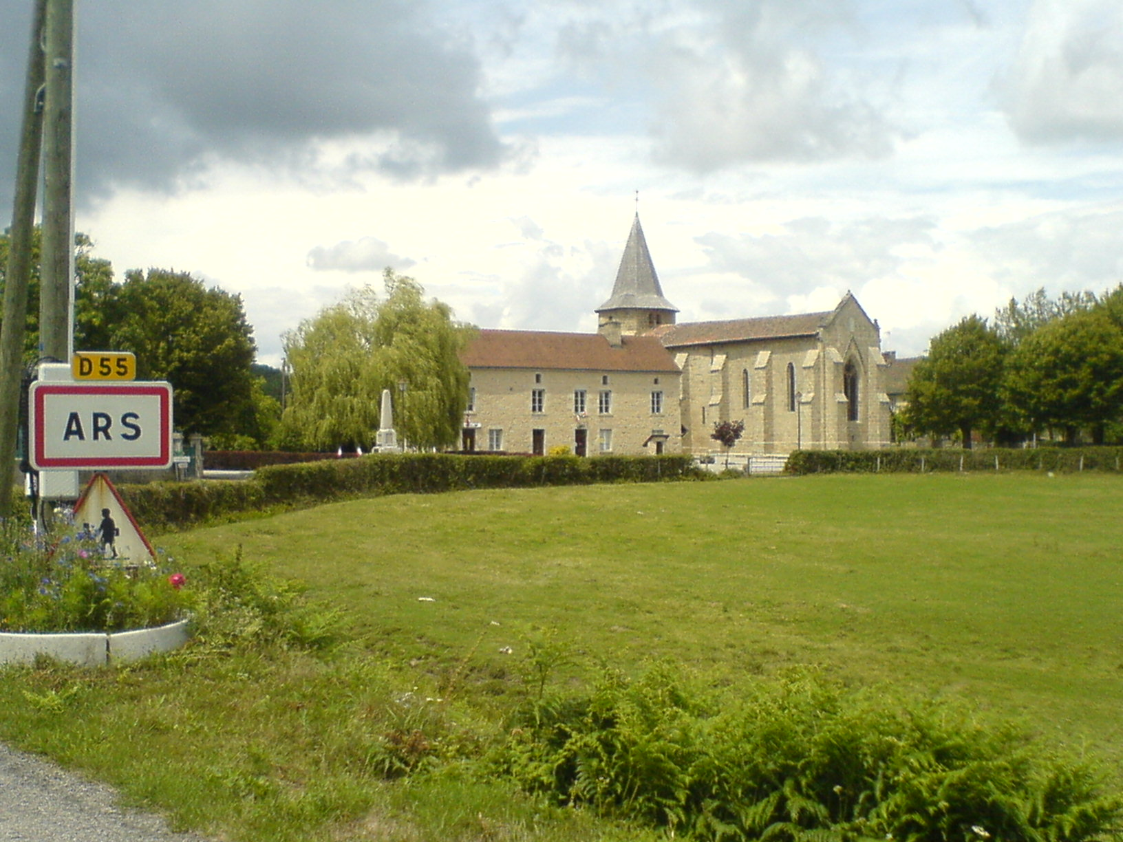 village ars